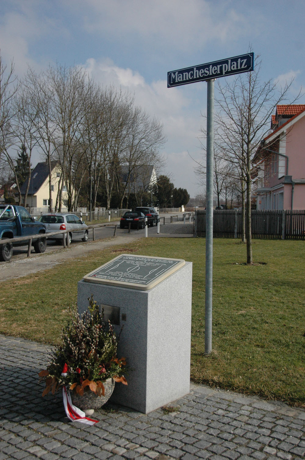 Gedenkstein an das Flugzeugunglück von München am 6. Februar 1958, bei dem 23 Menschen den Tod fanden, u.a. mehrere Spieler des Fußballvereins Manchester United. Der Gedenkstein befindet sich im Stadtteil Trudering an der Gabelung von Emplstraße und Rappenweg.